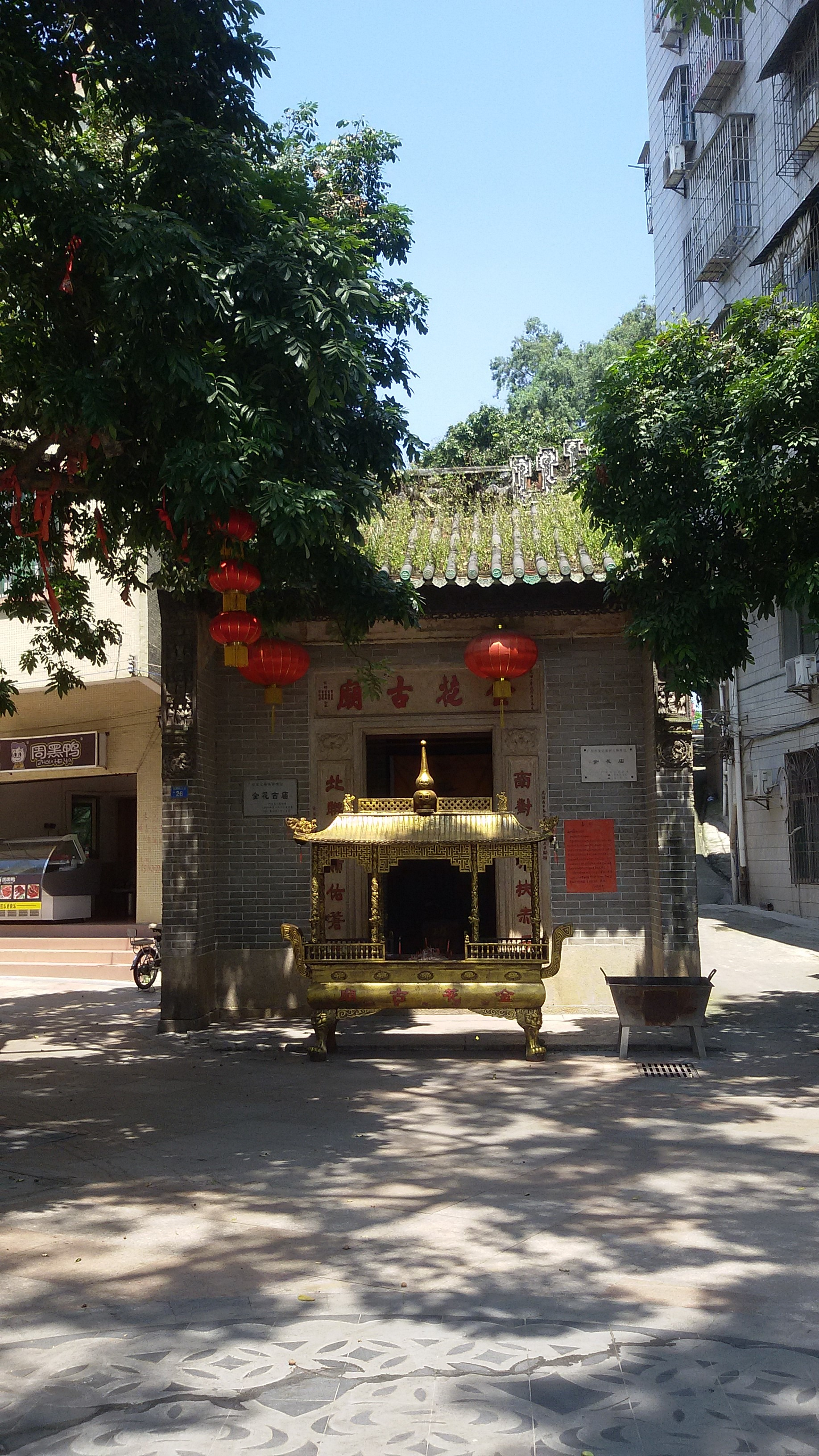 粵語: 金花古廟嘅建築本身